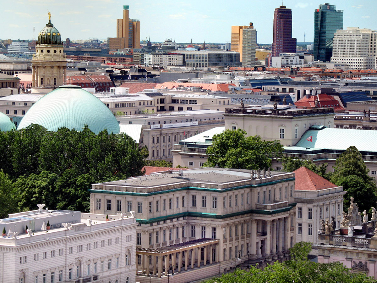 Blick über die Dächer von Berlin.